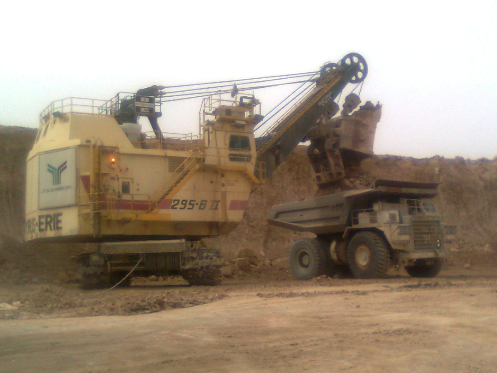 המחפר במפעל הפוספטים של כי"ל